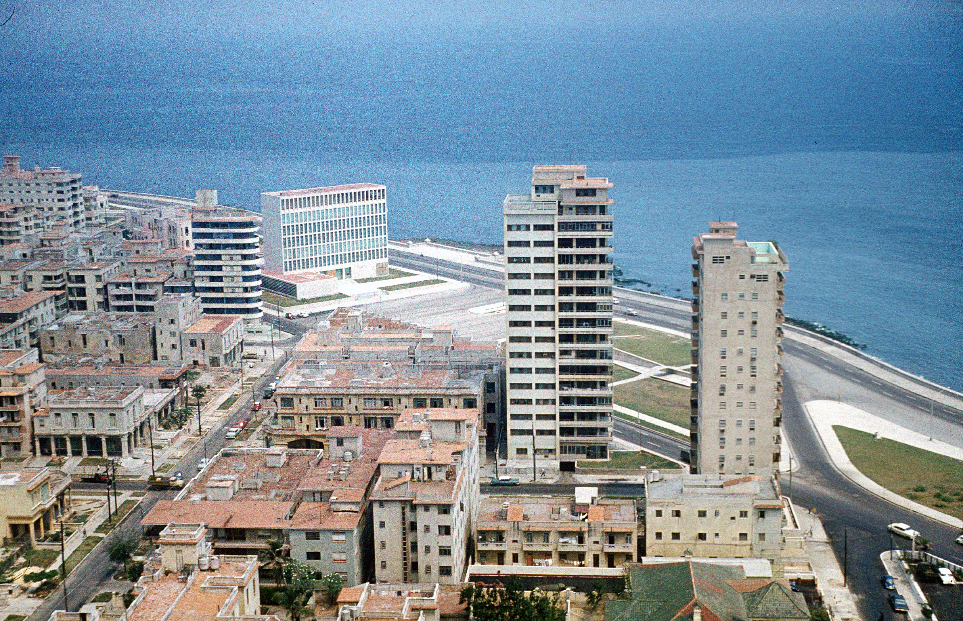 Havanna 1973; das Gebäude der ehemaligen US-Botschaft und heutigen US-Interessenvertretung (damals noch ohne Fahnenwald)